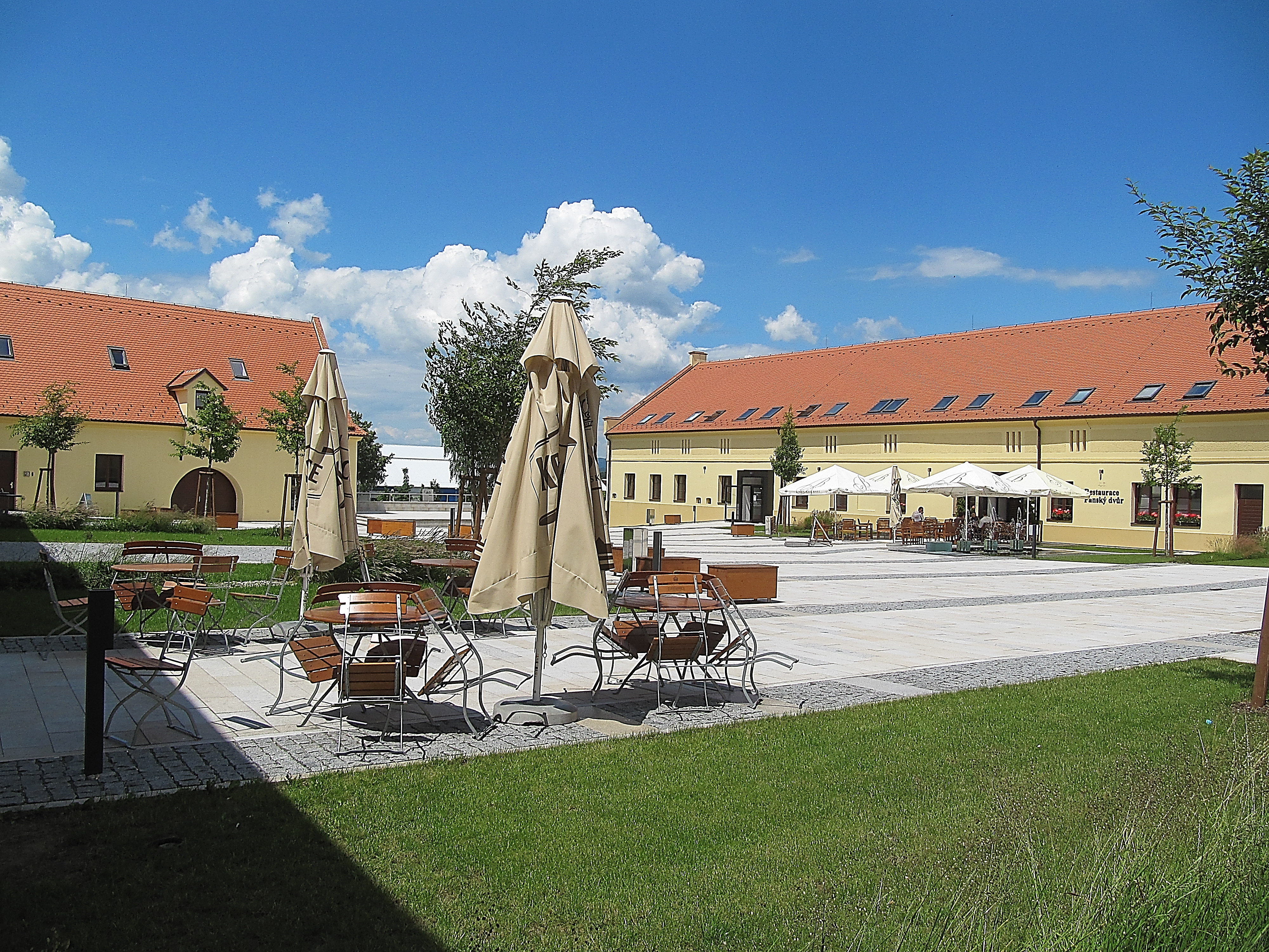 Zemědělský dvůr panský (Kunovice), nám. Svobody, ul. Panská 25, Kunovice